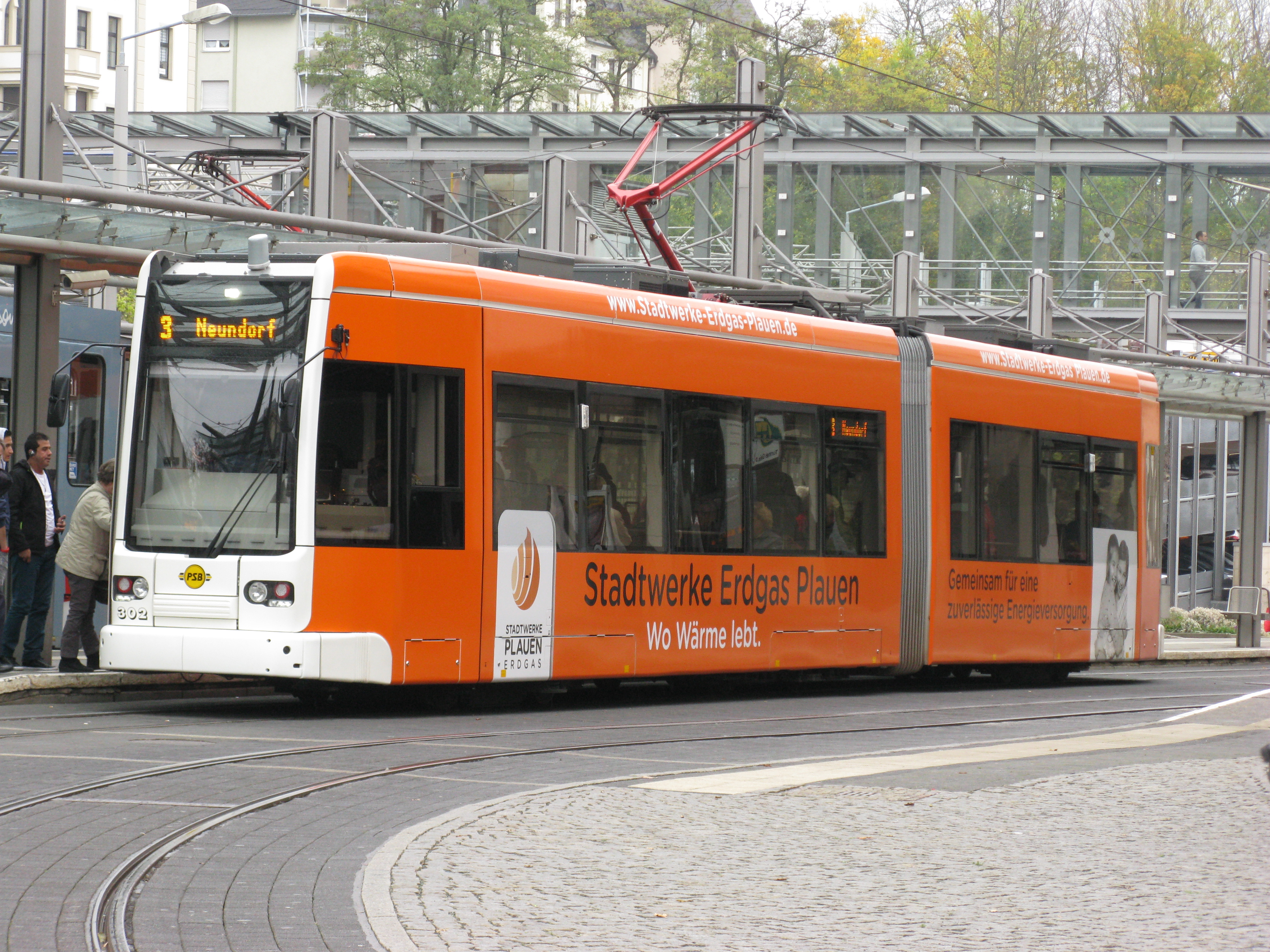 Plauener Straßenbahn: Triebwagen 302 (Bombardier Flexity Classic) an der zentralen Haltestelle "Tunnel"